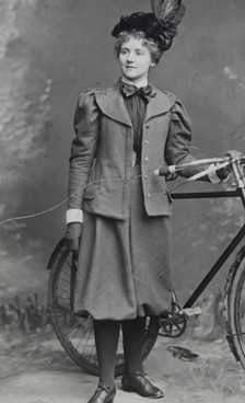 Imagen de Florence Wallace Pomeroy, luchadora por los derechos de las mujeres.